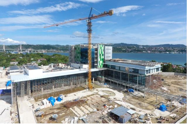 RSUP dr. Johannes Leimena dalam tahap pembangunan pada September 2019.